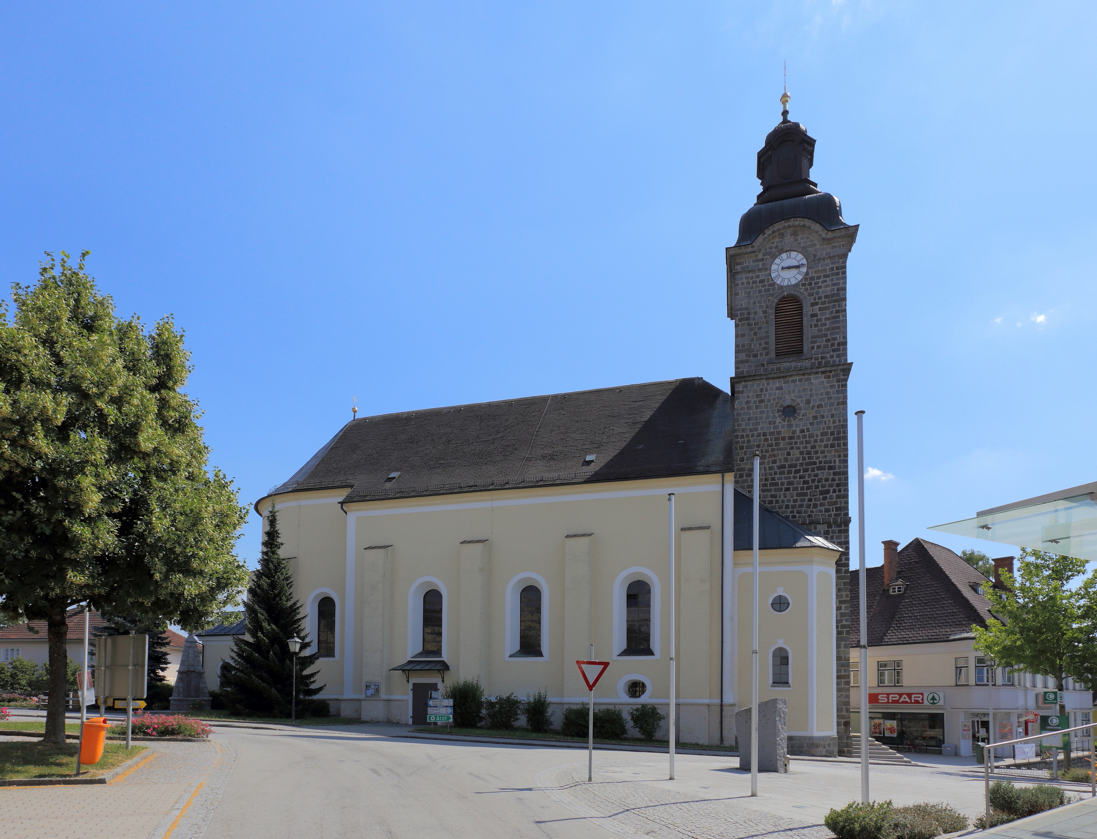 Katholische Pfarrkirche hl. Lambert in der oberösterreichischen Gemeinde Lambrechten. Eine große Saalkirche, die durch Abt Herculan Kalchgruber von 1724 bis 1726 errichtet wurde und der Kirchenturm mit einem geschwungenen Helm stammt aus dem Jahr 1912.